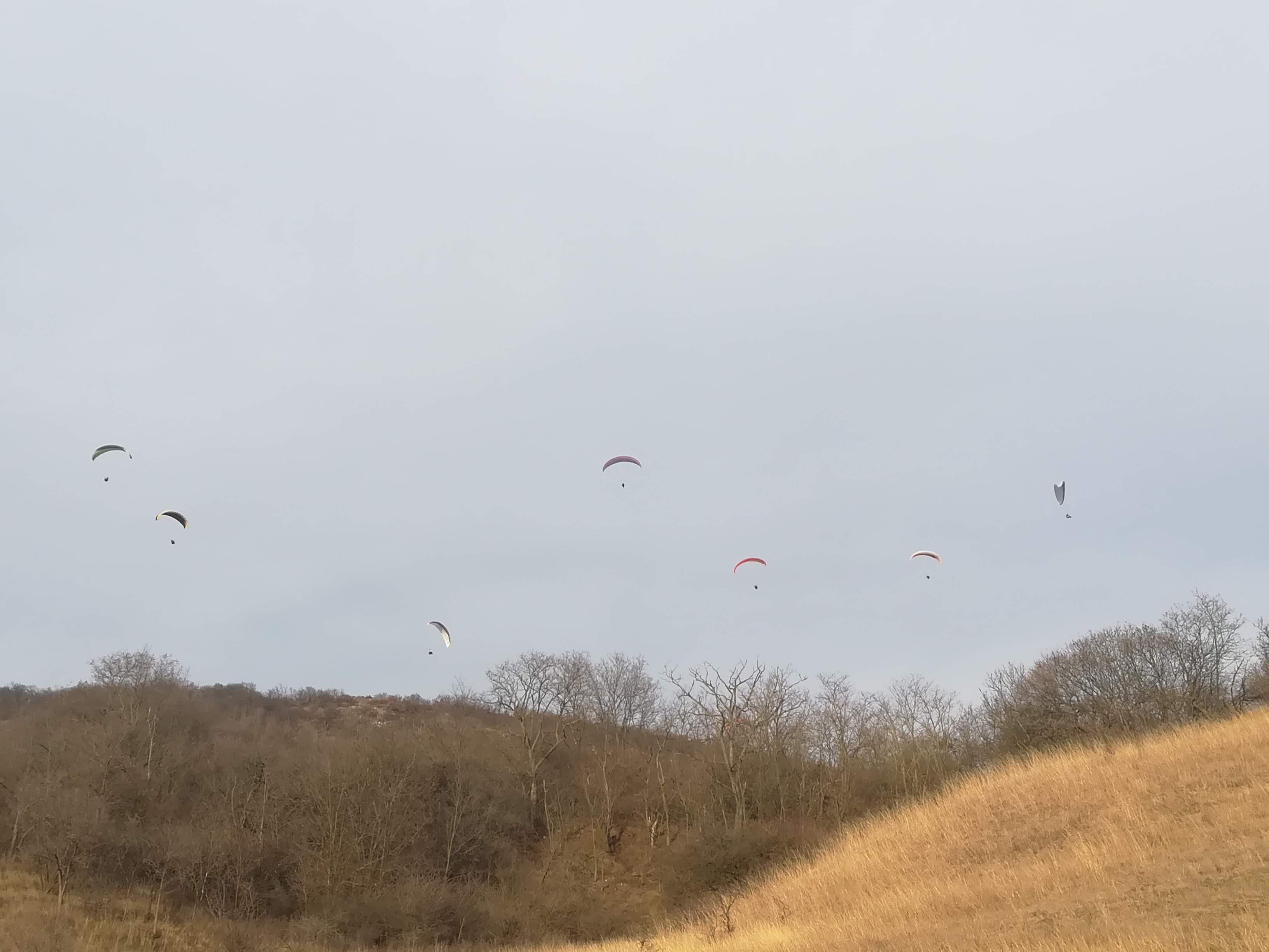 A fényképen hét siklóernyős pilóta látható, akik 2019 decemberében Csolnok melletti Mókus hegy gerincén lejtőznek.